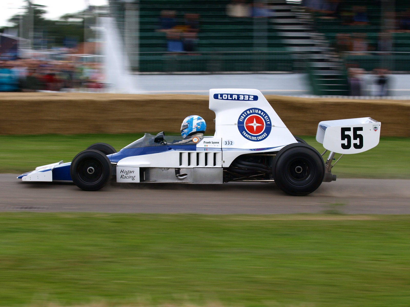 DT123842